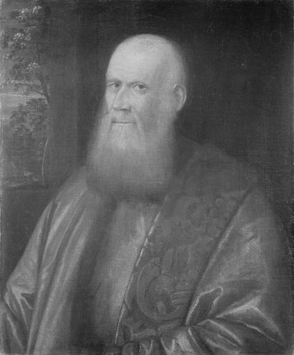 Autore Santo Zago (attibuzione) Anagrafica Venezia 1500 circa - ante 1568 Titolo Ritratto di senatore veneziano Datazione 1550 circa Provenienza collezione Guglielmo Lochis, 1866 Tipologia dipinto Tecnica olio su tela Inventario 81LC00149 Misure 77 x 63 cm Collocazione non esposto